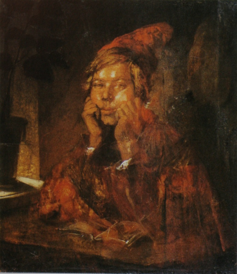 Раев Василий Егорович - Автопортрет